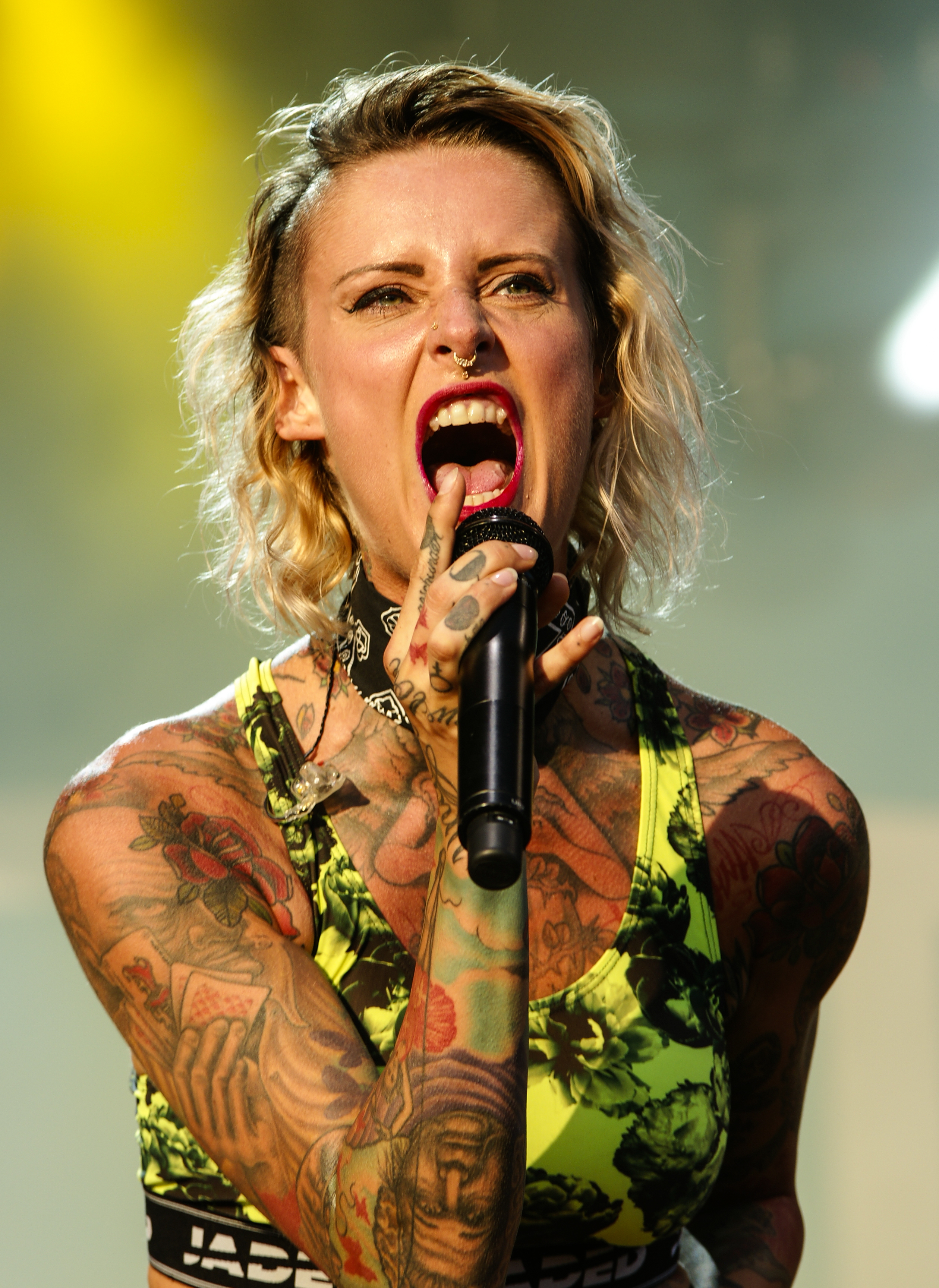 Deichbrandfestival an der Nordsee 2015 Seeflughaven Nordholz Cuxhaven